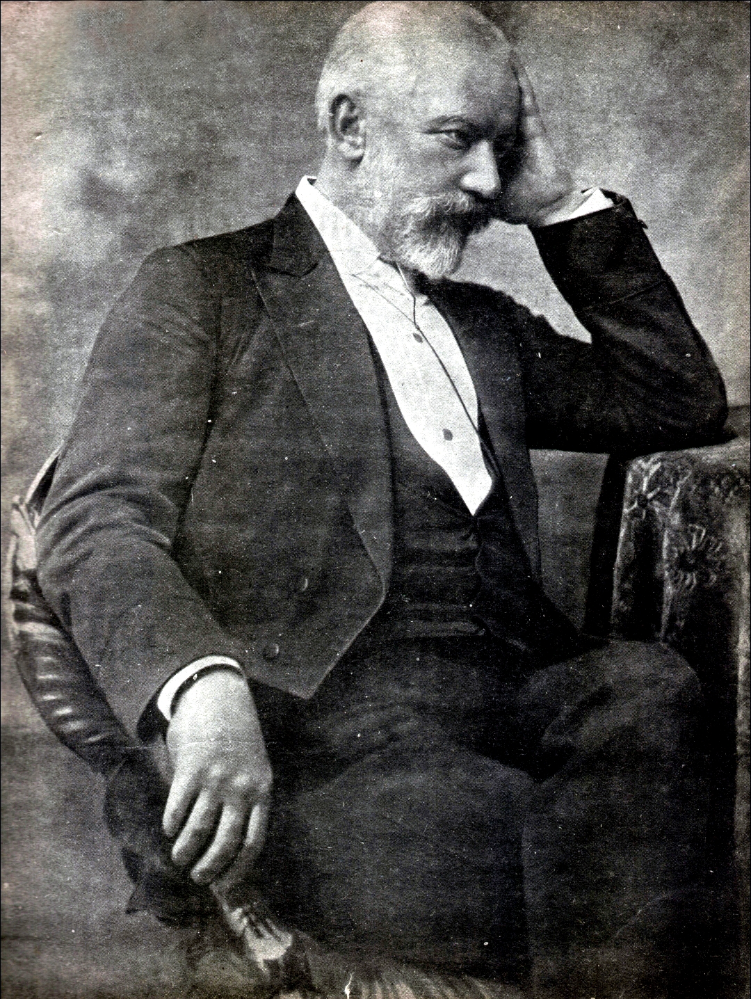 П.И. Чайковский